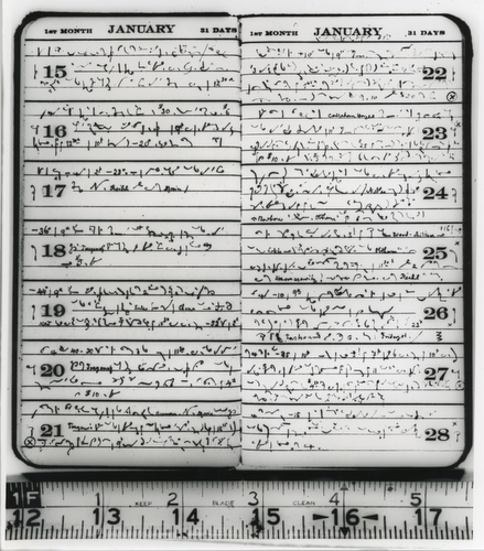 Stenografia taglilbro de Richard H. Geoghegan.